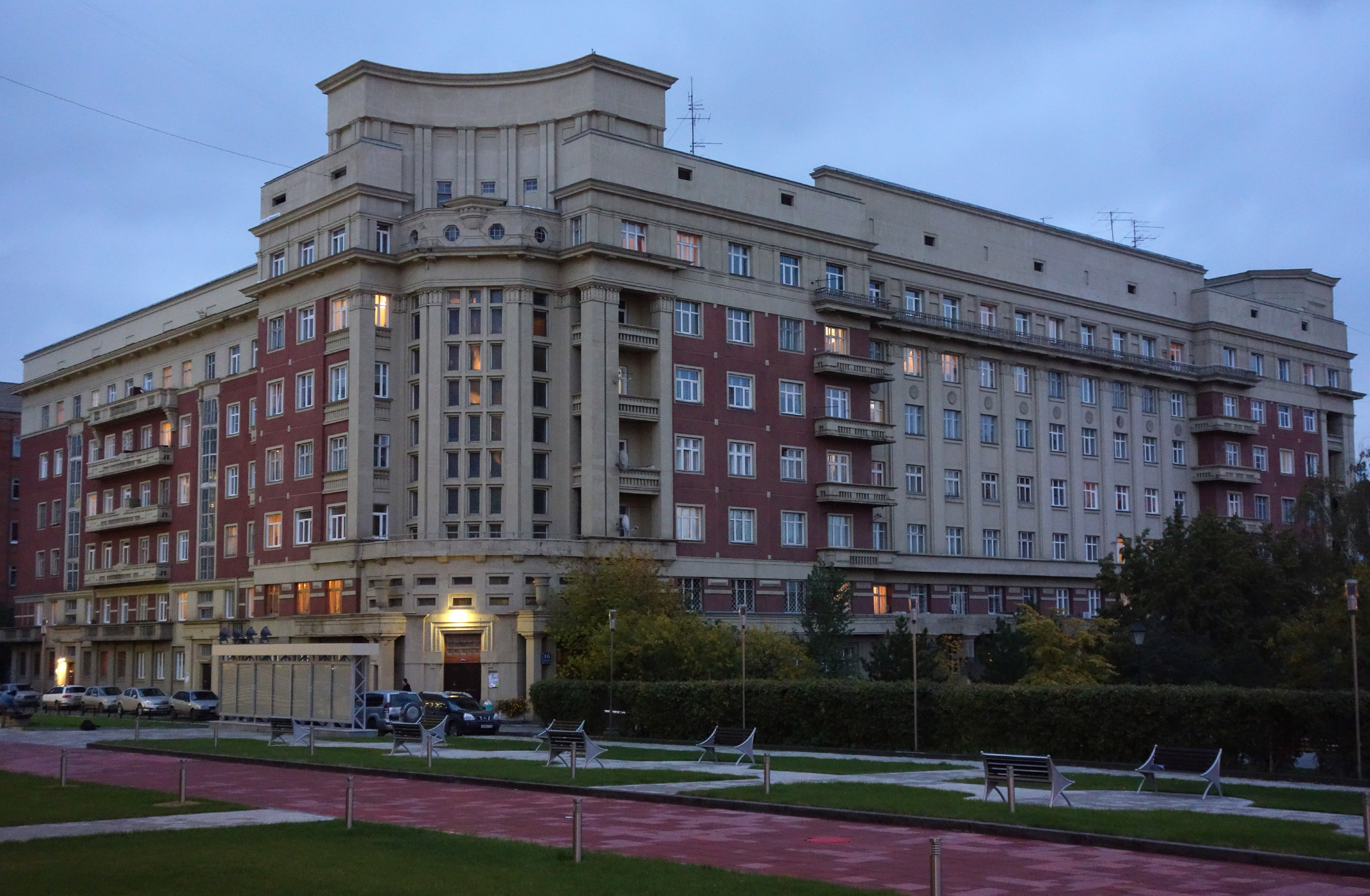 Дом жилой (100-квартирный) (Новосибирская область, Новосибирск, Красный проспект, 16)